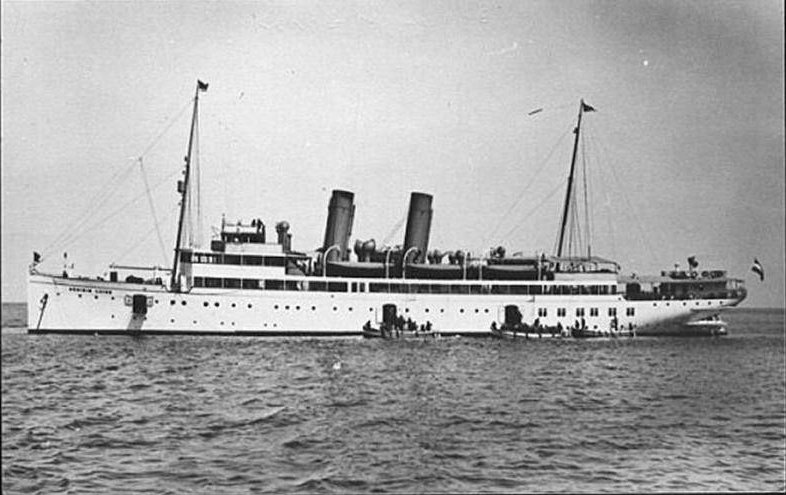 Das Seebäderschiff Königin Luise (I) der Hapag